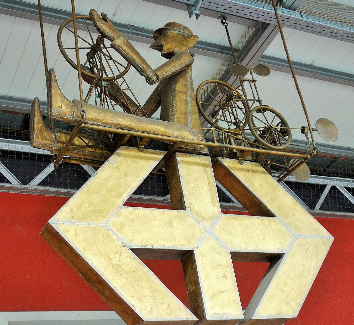 Skulptur Bahnhof Olten, Schweiz